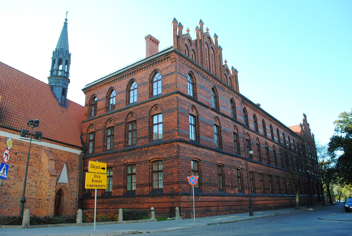 Wyższe Seminarium Duchowne we Włocławku